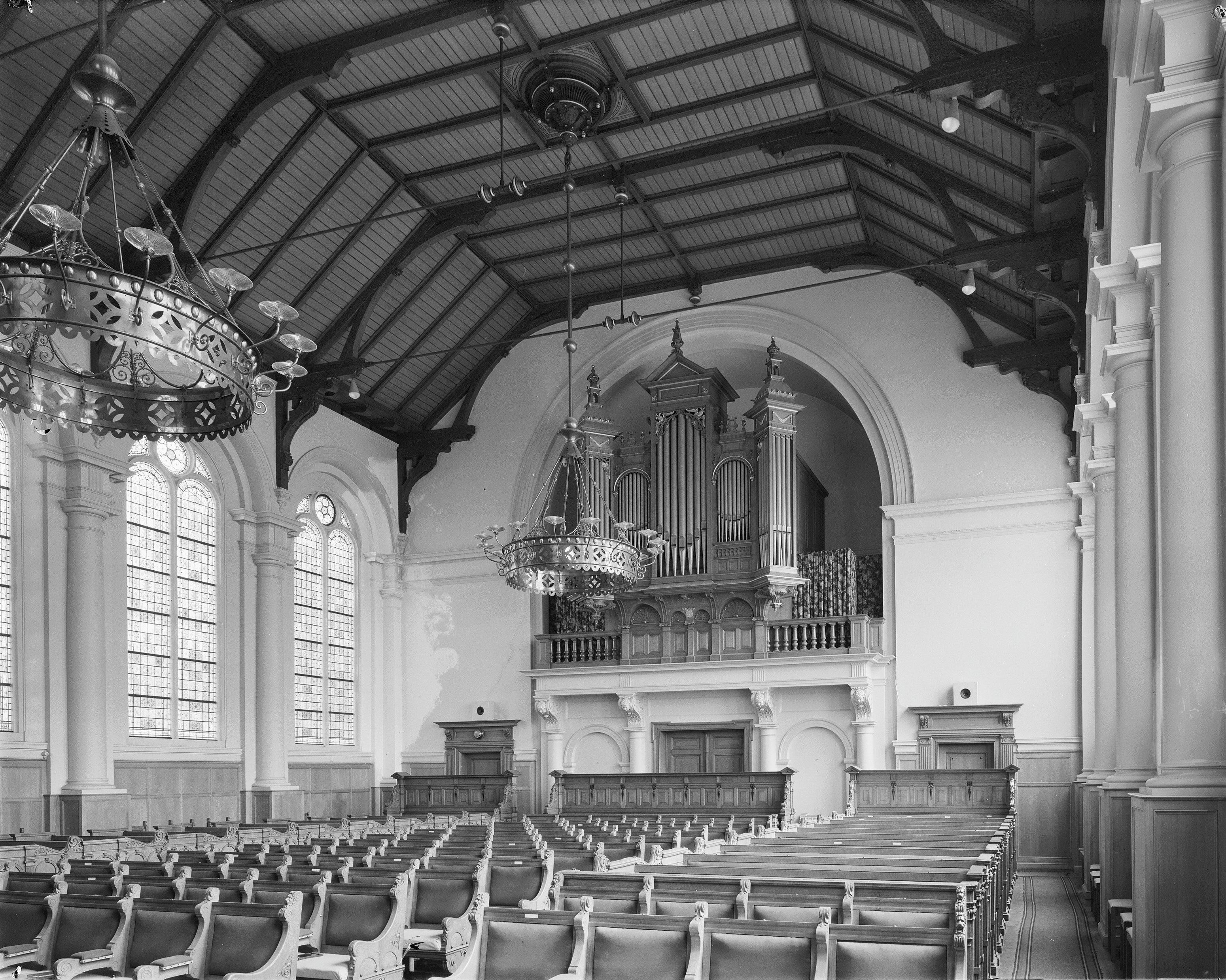 Doopsgezinde Kerk: interieur, naar het orgel